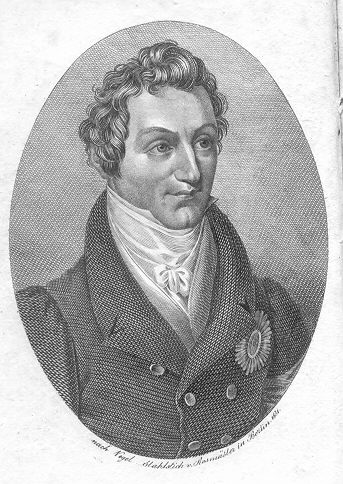 Beschreibung: Jugendbildnis des Königs Johann von Sachsen (Stahlstich von 1831) Quelle: Gothaischer genealogischer Hof-Kalender auf das Jahr 1832 Zeichner: Rosmäsler nach Vogel